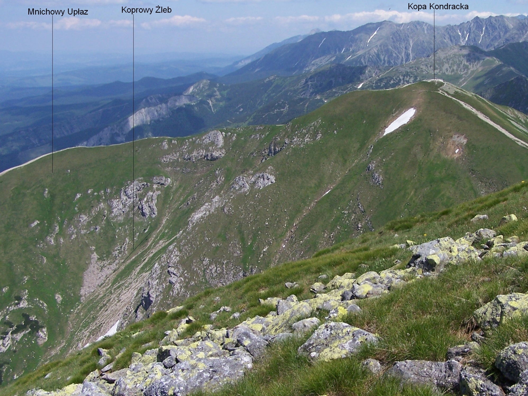 Widok z Czerwonego Upłazu